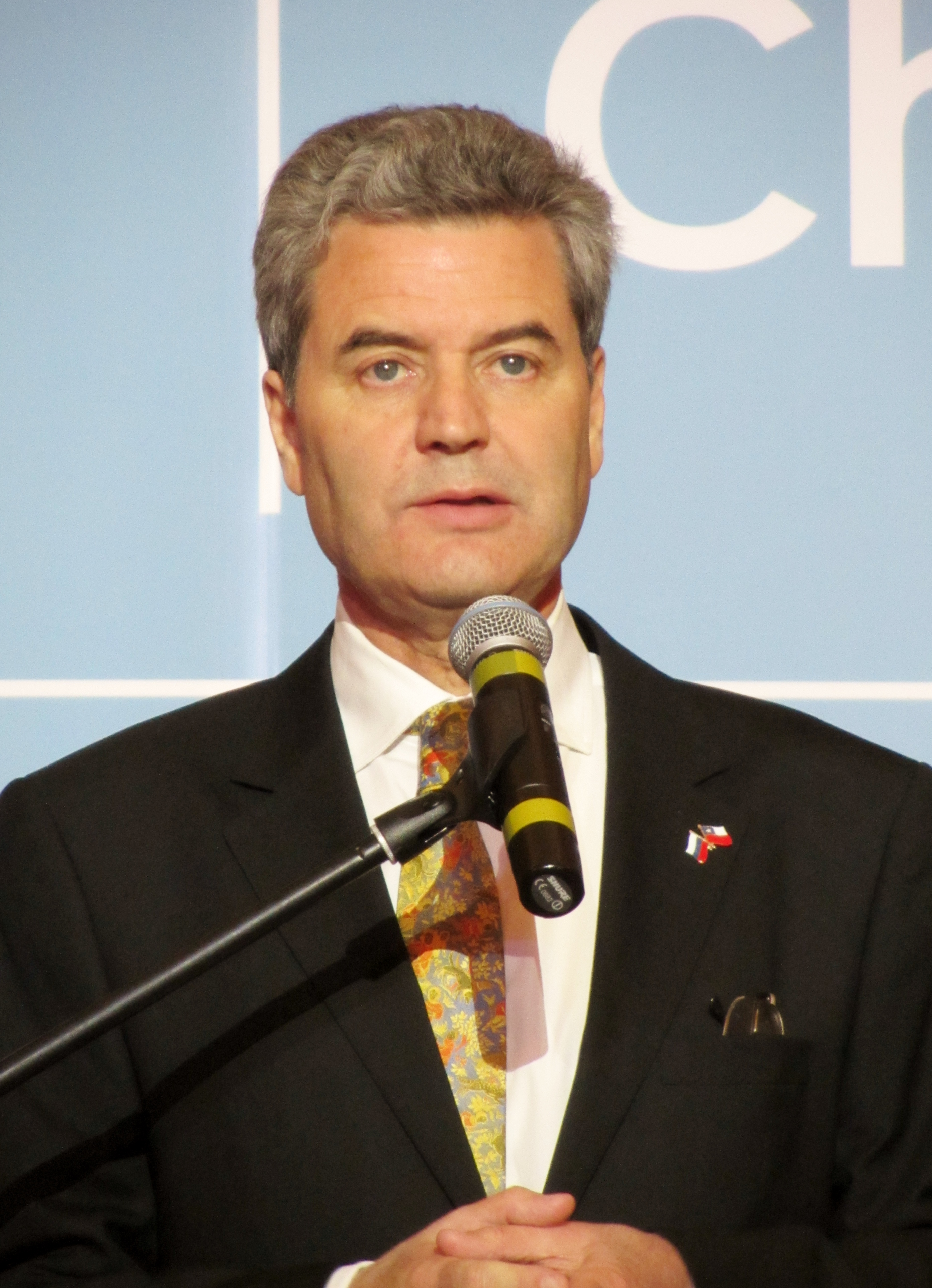 Juan Eduardo Eguiguren, embajador de Chile en Rusia, 2015